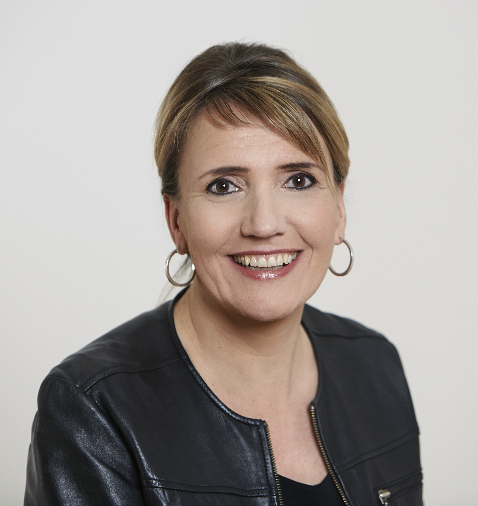 Simone Peter, Bundesvorsitzende von Bündnis 90/Die Grünen